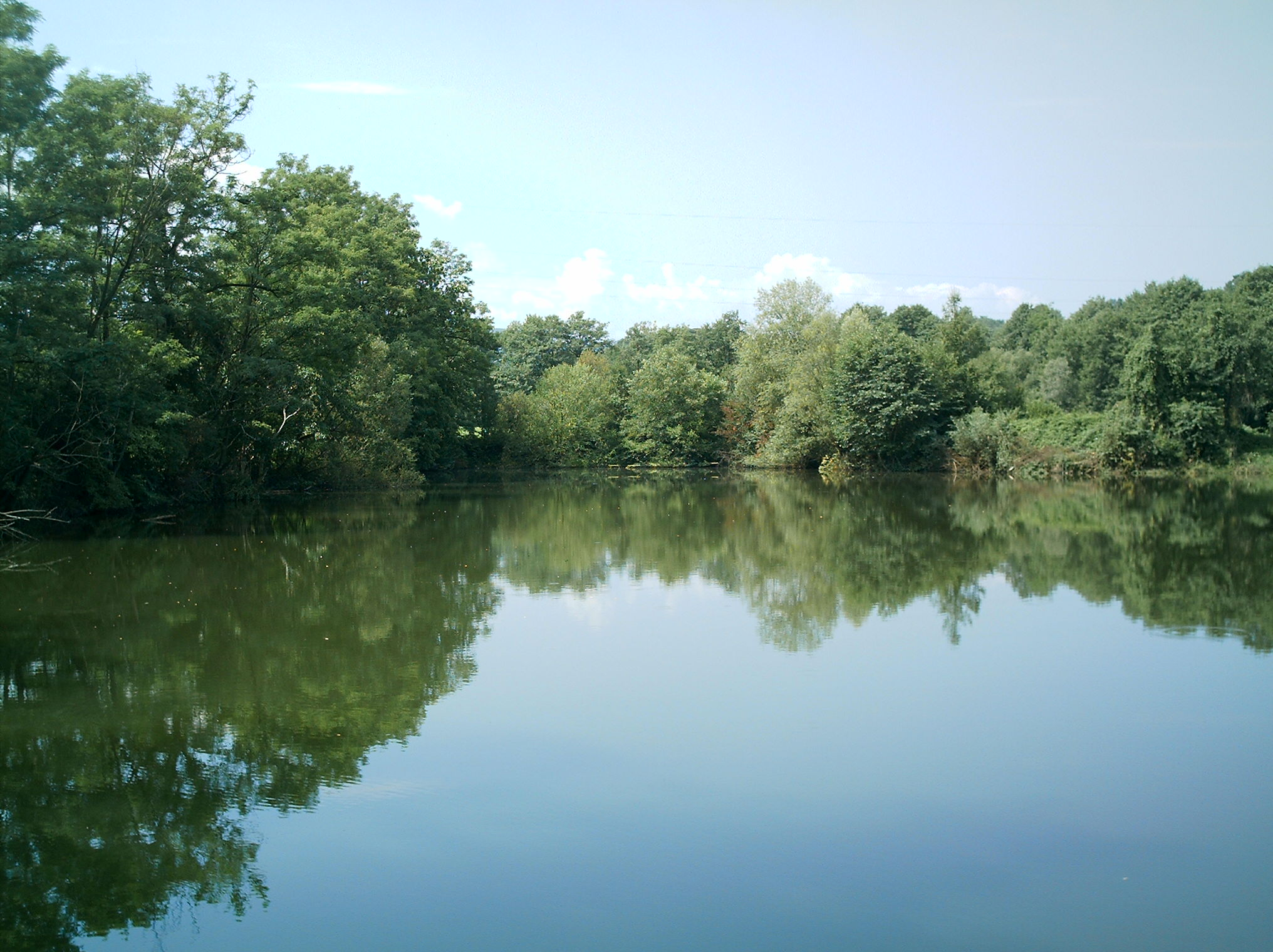 Гомјеничко језеро. Лично дјело.